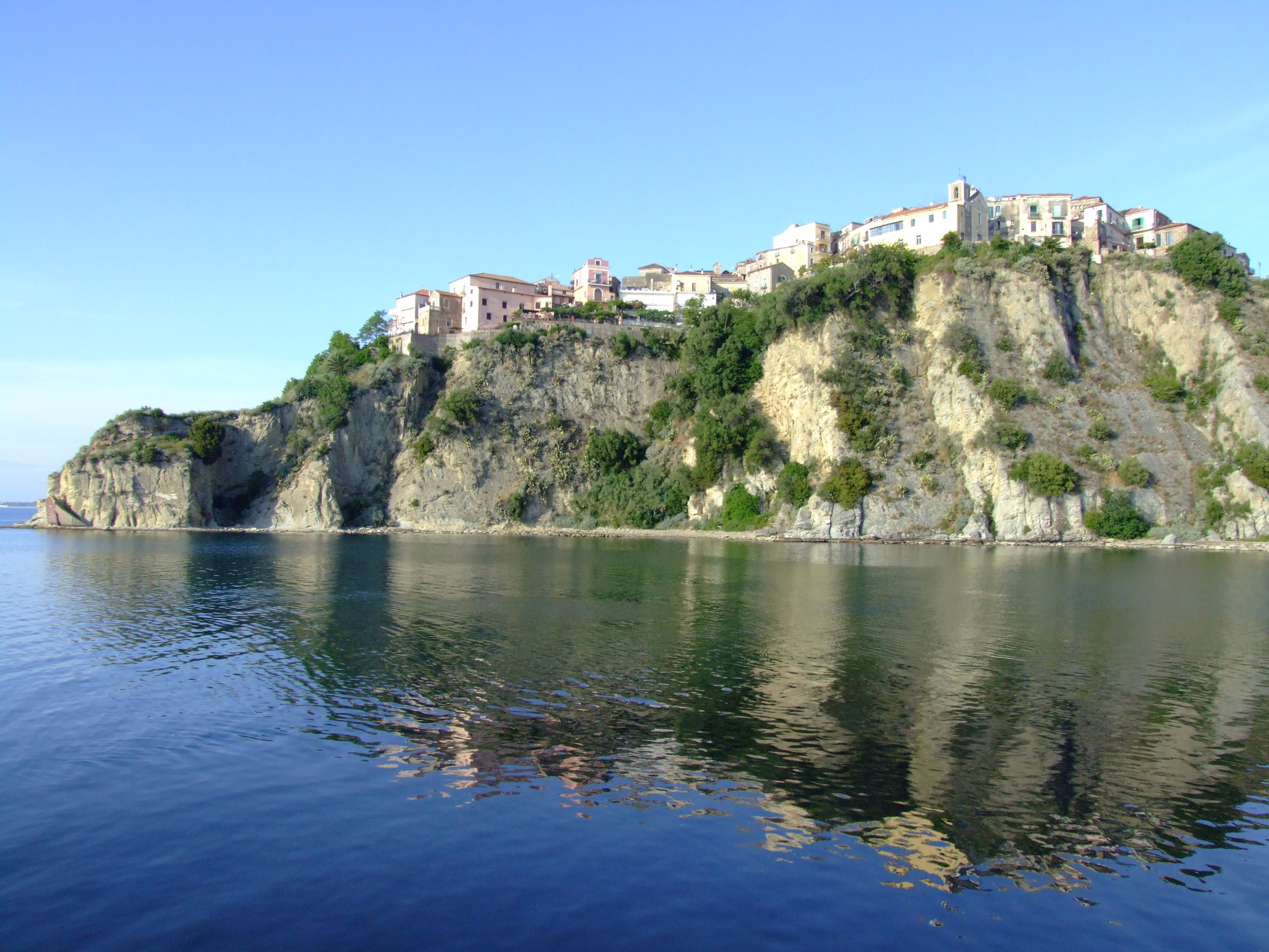 Agropoli, promontorio